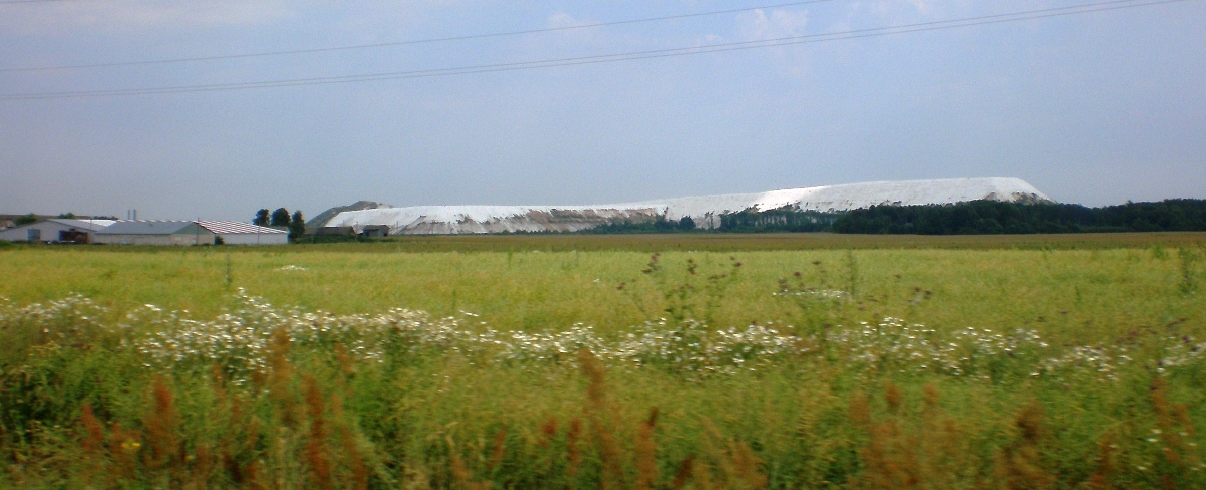 Kėdainių AB "Lifosa" fosfogipso kalnai. Medėkšių apylinkės, Kėdainių raj.